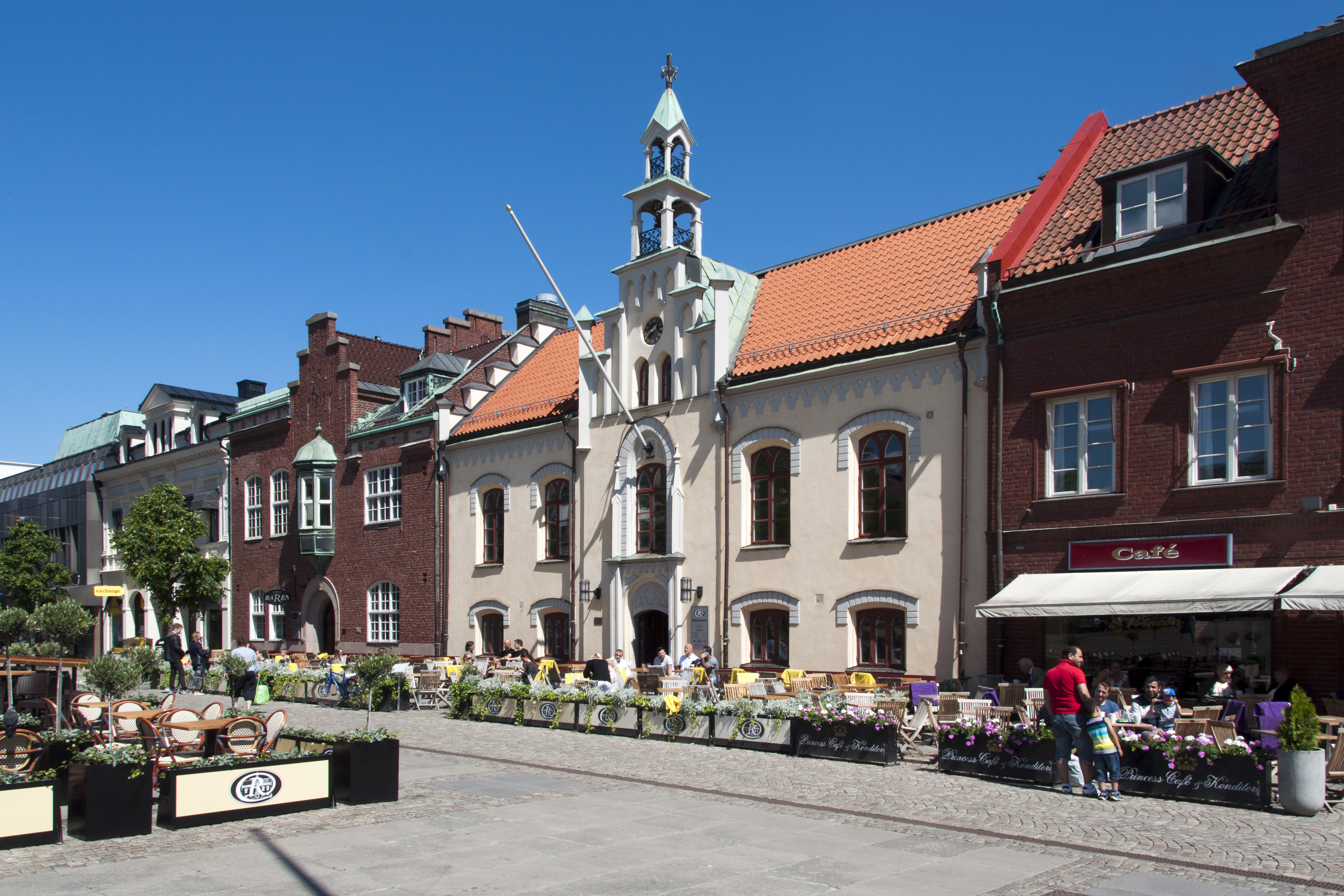 Rådhuset i Skövde, uppfört 1775-76. Arkitekt troligen Sven Westman. Ombyggt 1853. Arkitekt Löjtnant Hjalmar Wijnbladh. Utbyggnad med kaslihus 1915. Arkitekt P.O Hallman